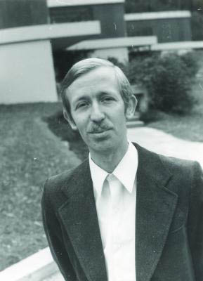 Tammo tom Diek 1972 in Oberwolfach